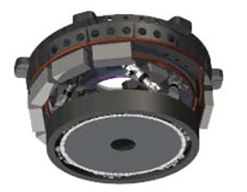 E-ELT-M4--mirror 2.4-m Flat Segmented (6 petals) Adaptive + Position Control